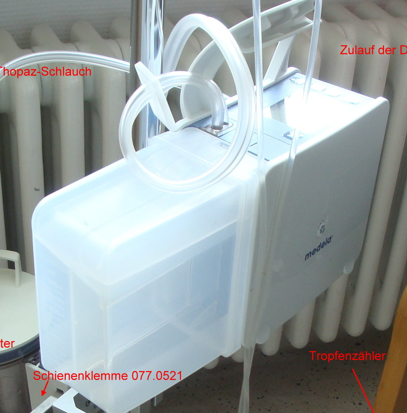 digitales Thoraxdrainagesystem